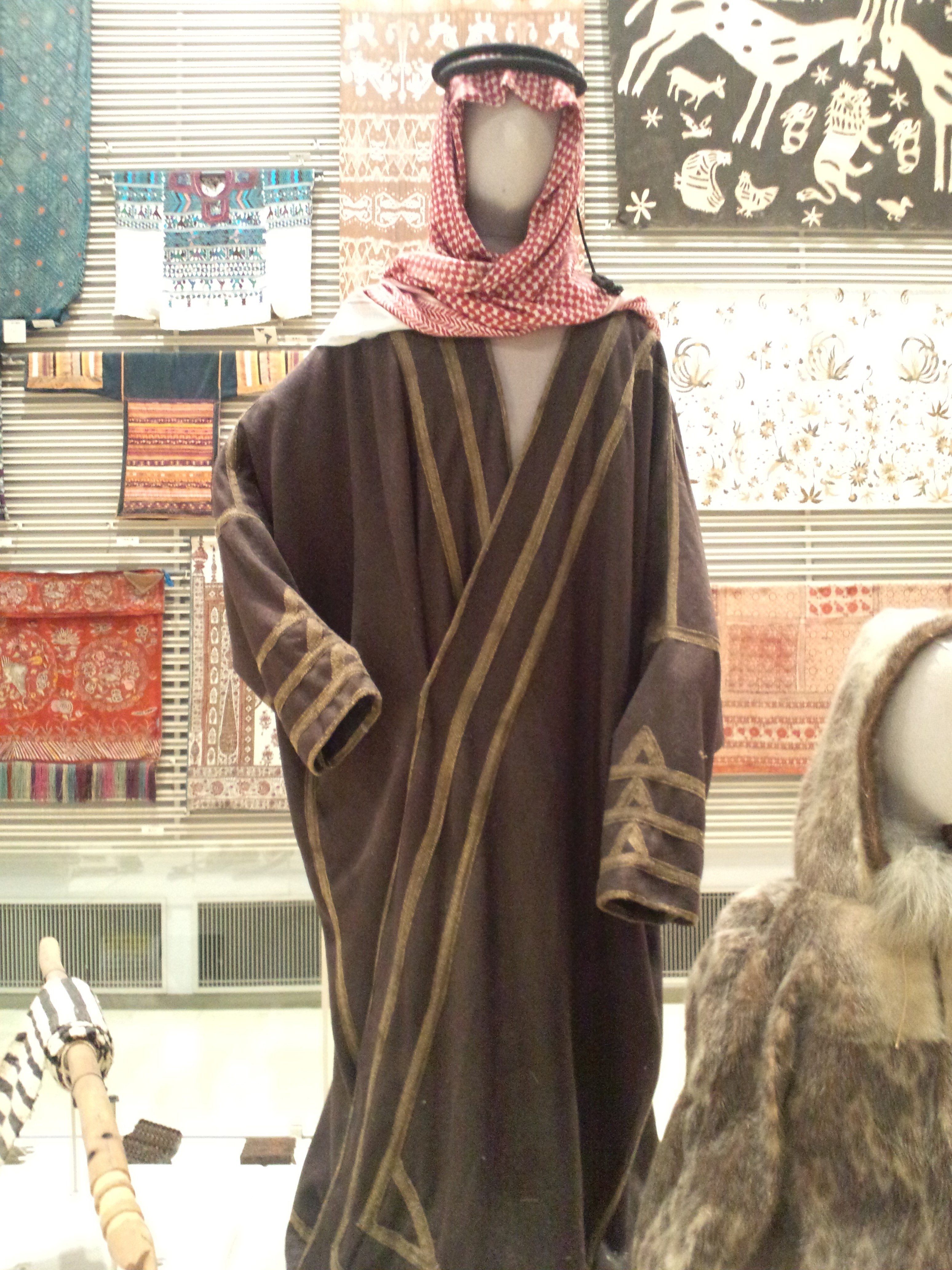 リトルワールド 本館展示室 ベドウィンの衣装（シリア）